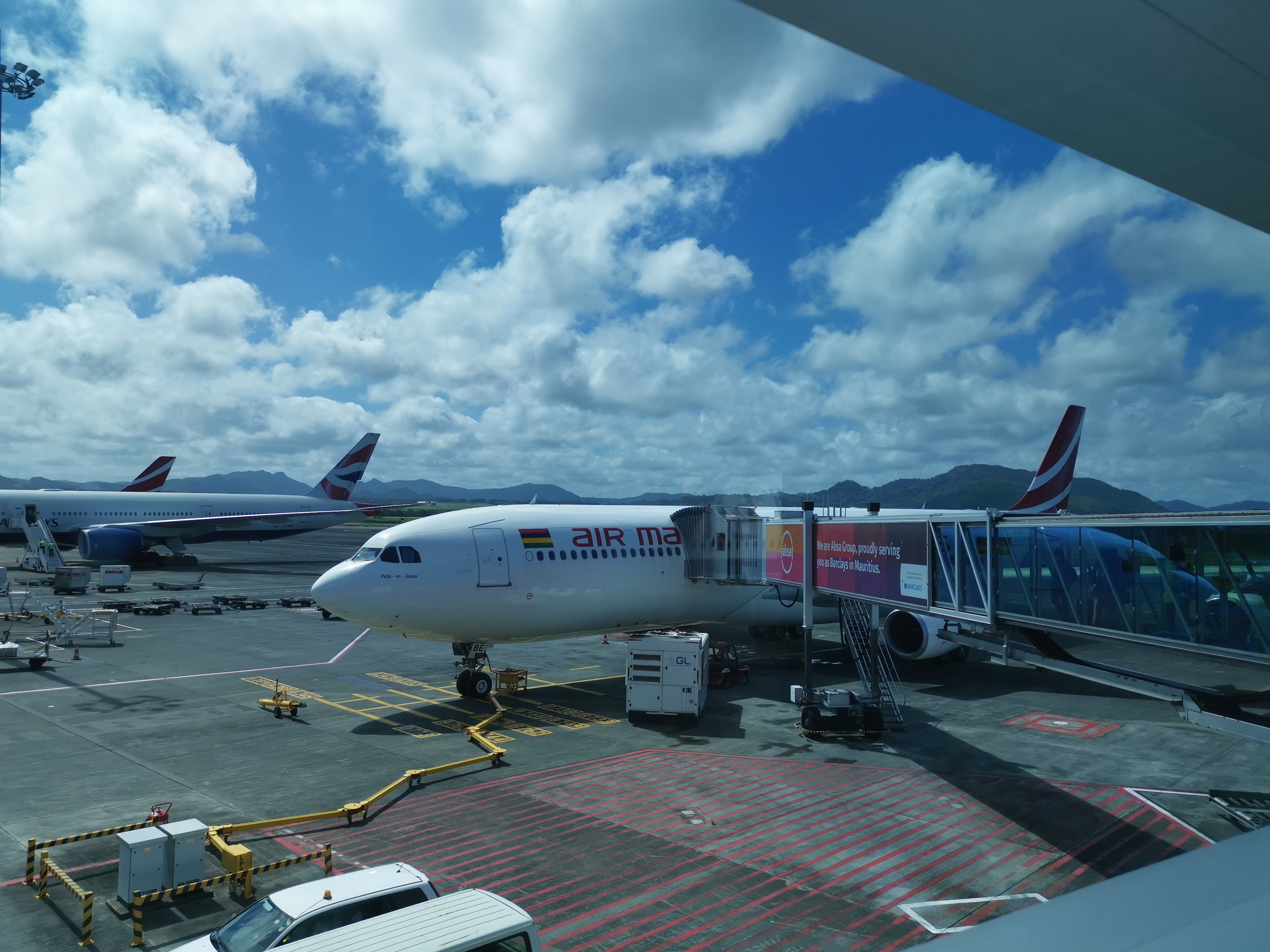 Flughafen Mauritius